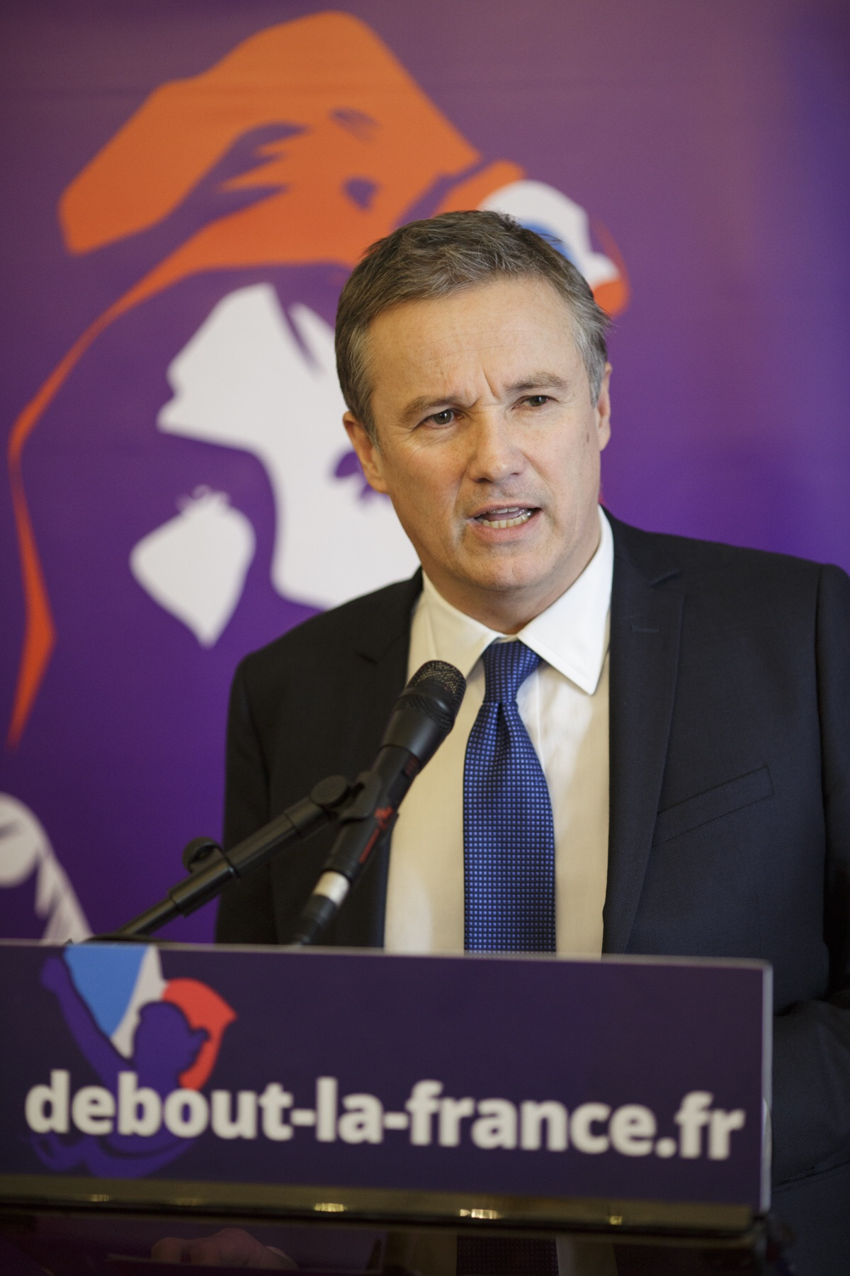 Voeux de Nicolas Dupont-Aignan à la presse - le 22 janvier 2015